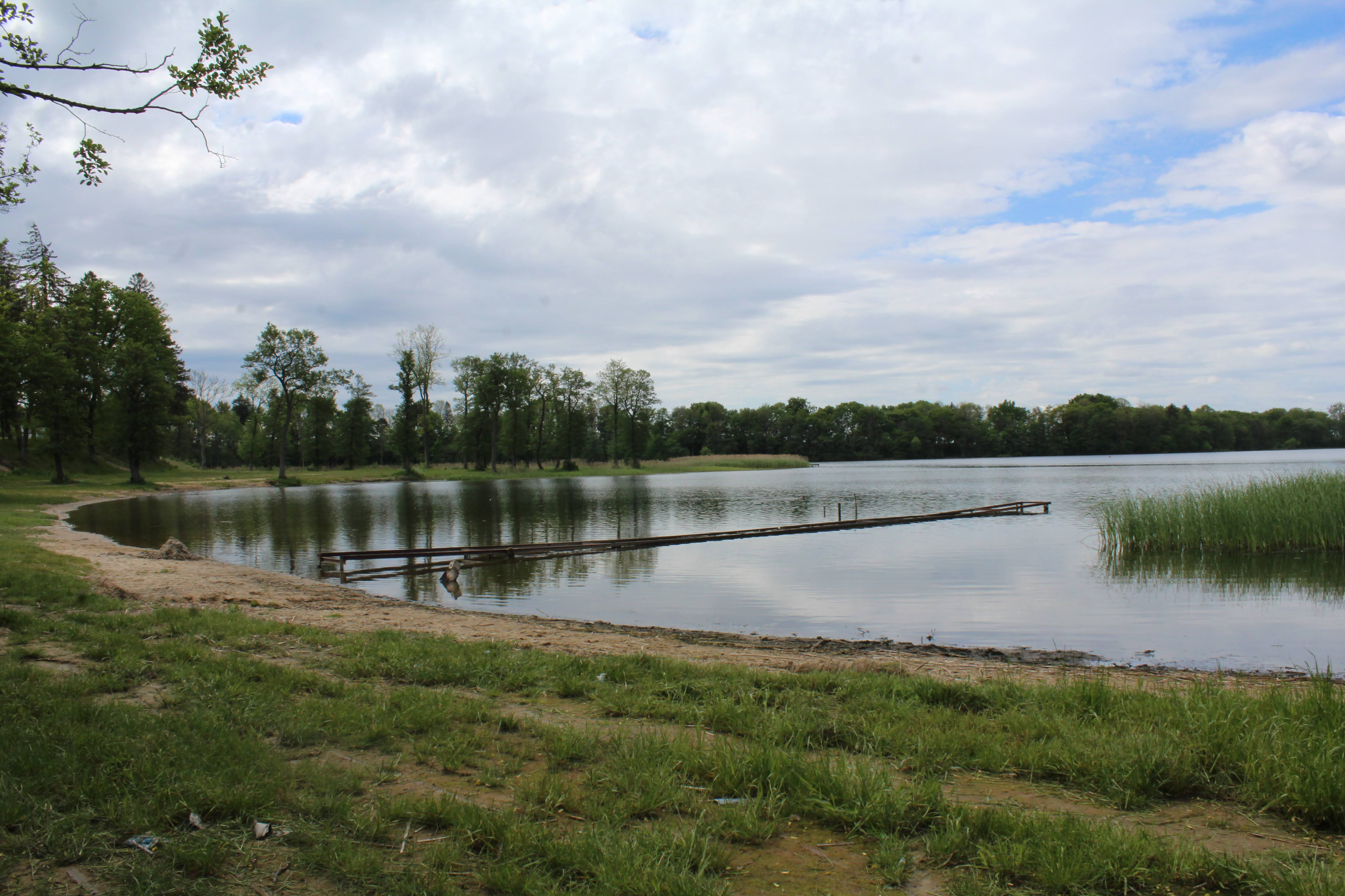 Jezioro Parnowskie na Równinie Białogardzkiej